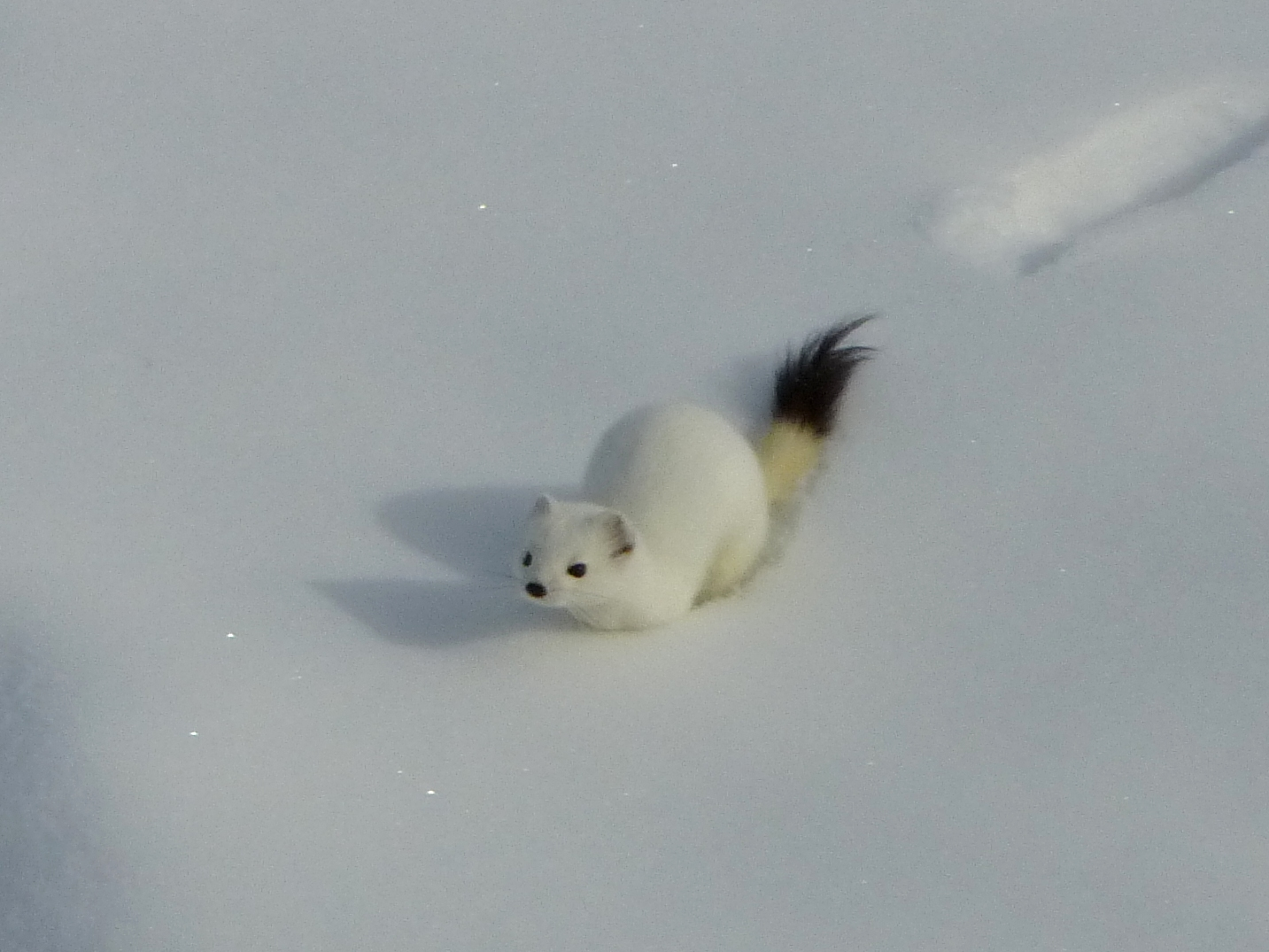 Горностай на снегу. Виден чёрный окрас кончика хвоста. Снято в Заилийском Алатау.